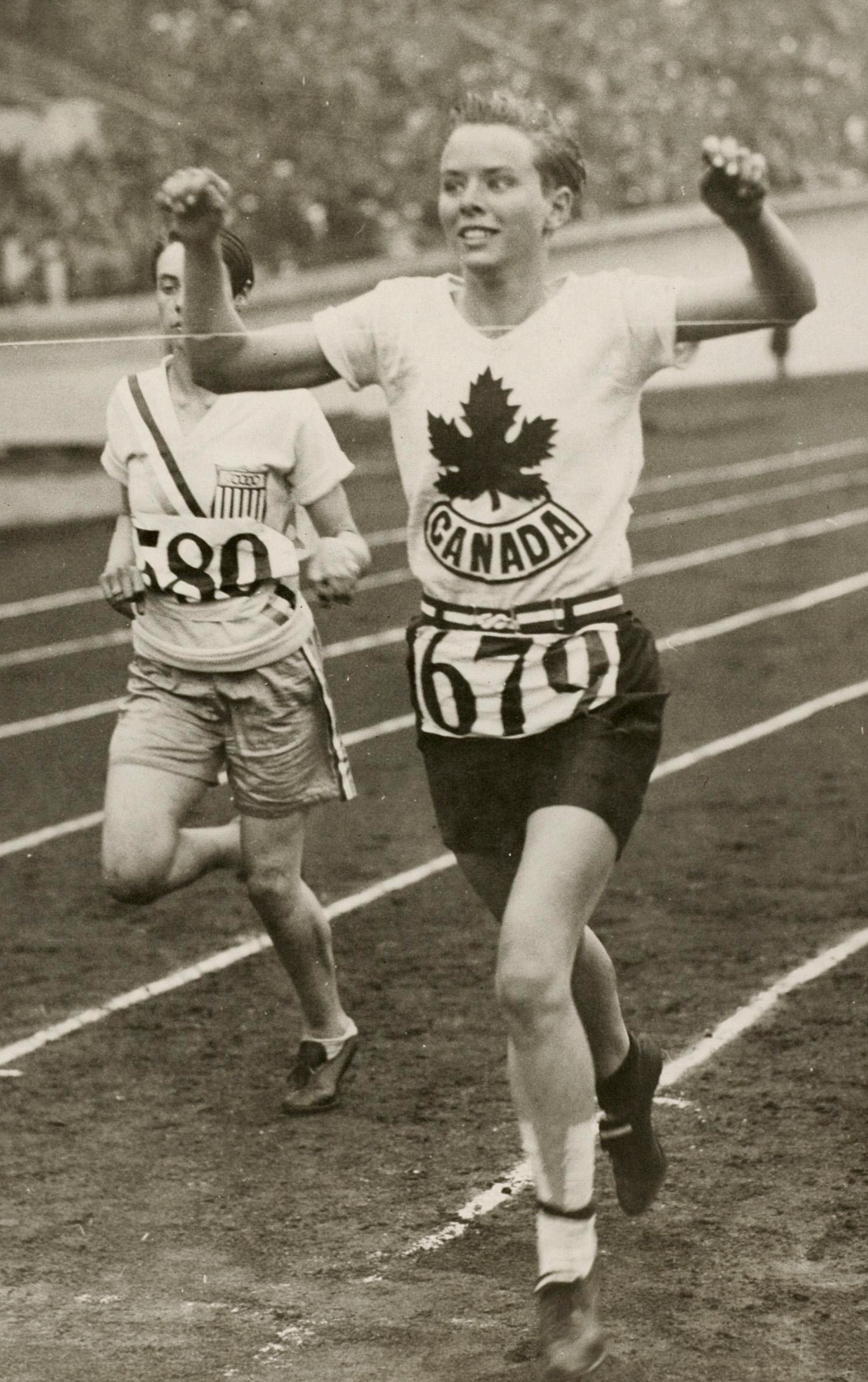 Title / Titre : Jean Thompson of Canada (right) competing in the women's 800 meters race at the VIIIth Summer Olympic Games / Jean Thompson (à droite), du Canada, participant à l'épreuve du 800 mètres femmes, aux VIIIe Jeux Olympiques d'été Creator(s) / Créateur(s) : Unknown / Inconnu Date(s) : 1928 Reference No. / Numéro de référence : MIKAN 3191815, 3623319 Location / Lieu : Amsterdam, Netherlands / Amsterdam, Pays-Bas Credit / Mention de source : Library and Archives Canada, PA-151008 / Bibliothèque et Archives Canada, PA-151008